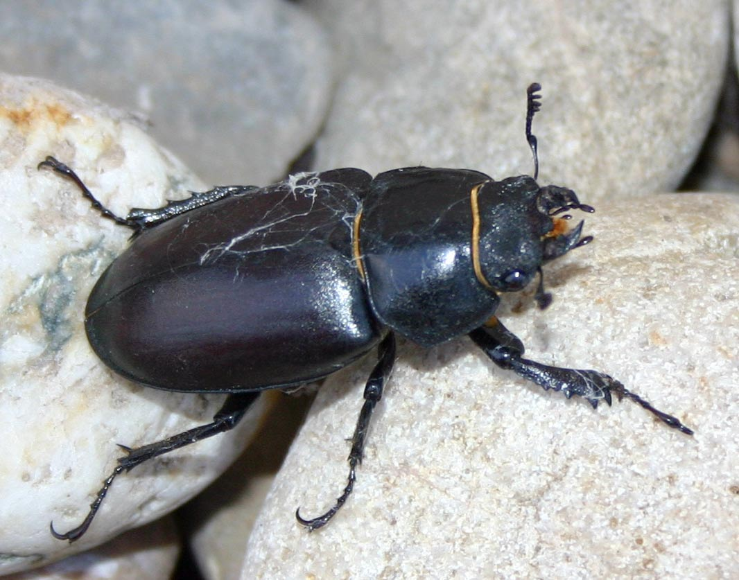 Lucanus cervus femininum